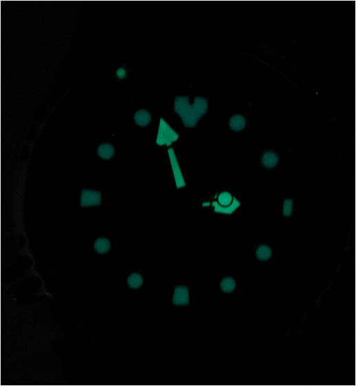 Dunkelablesbarkeit